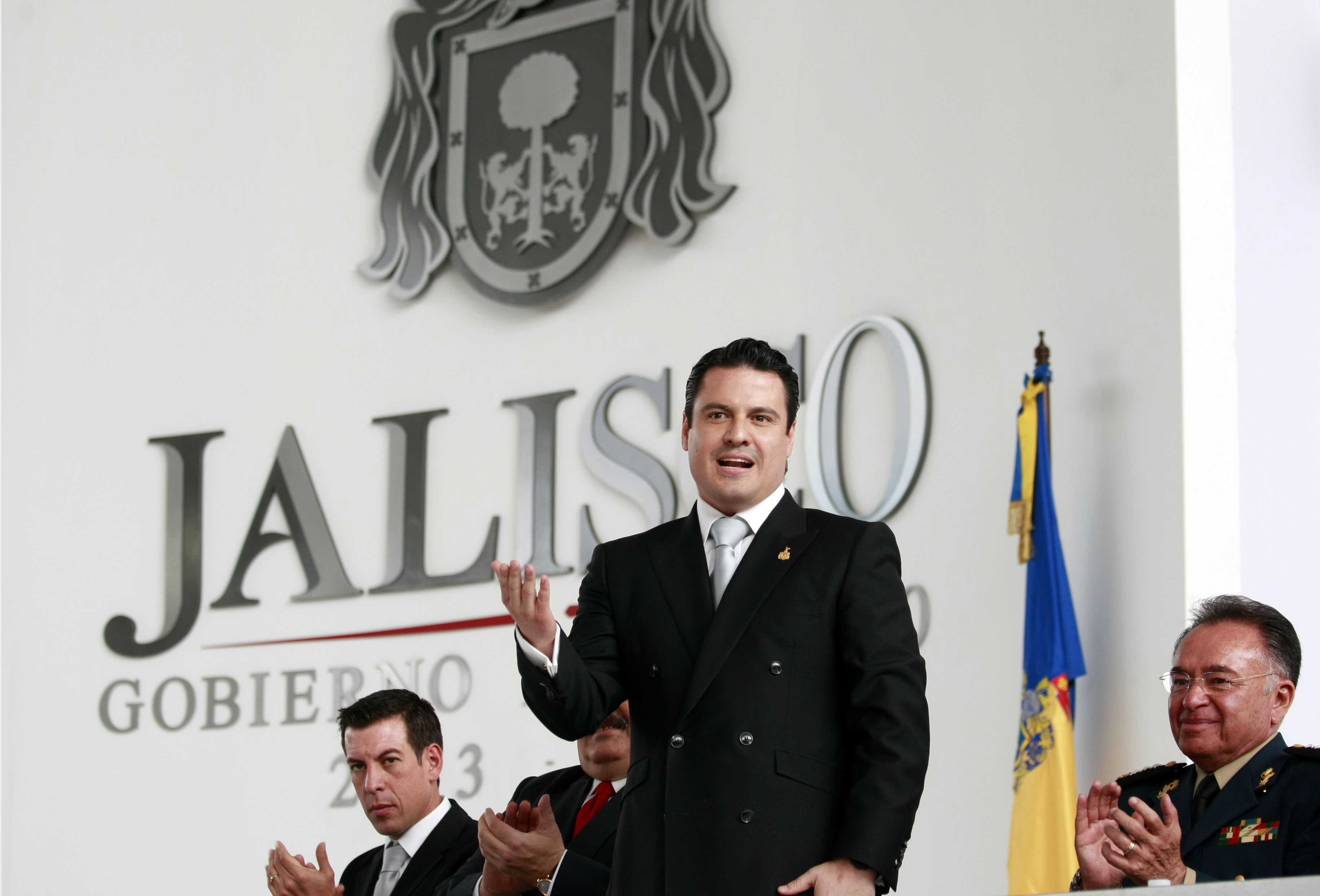 01-03-2013 discurso en el instituto cultural cabaÑAs